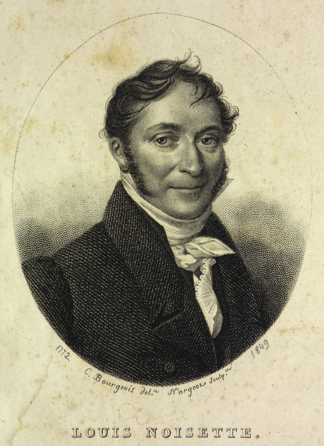 Louis Noisette